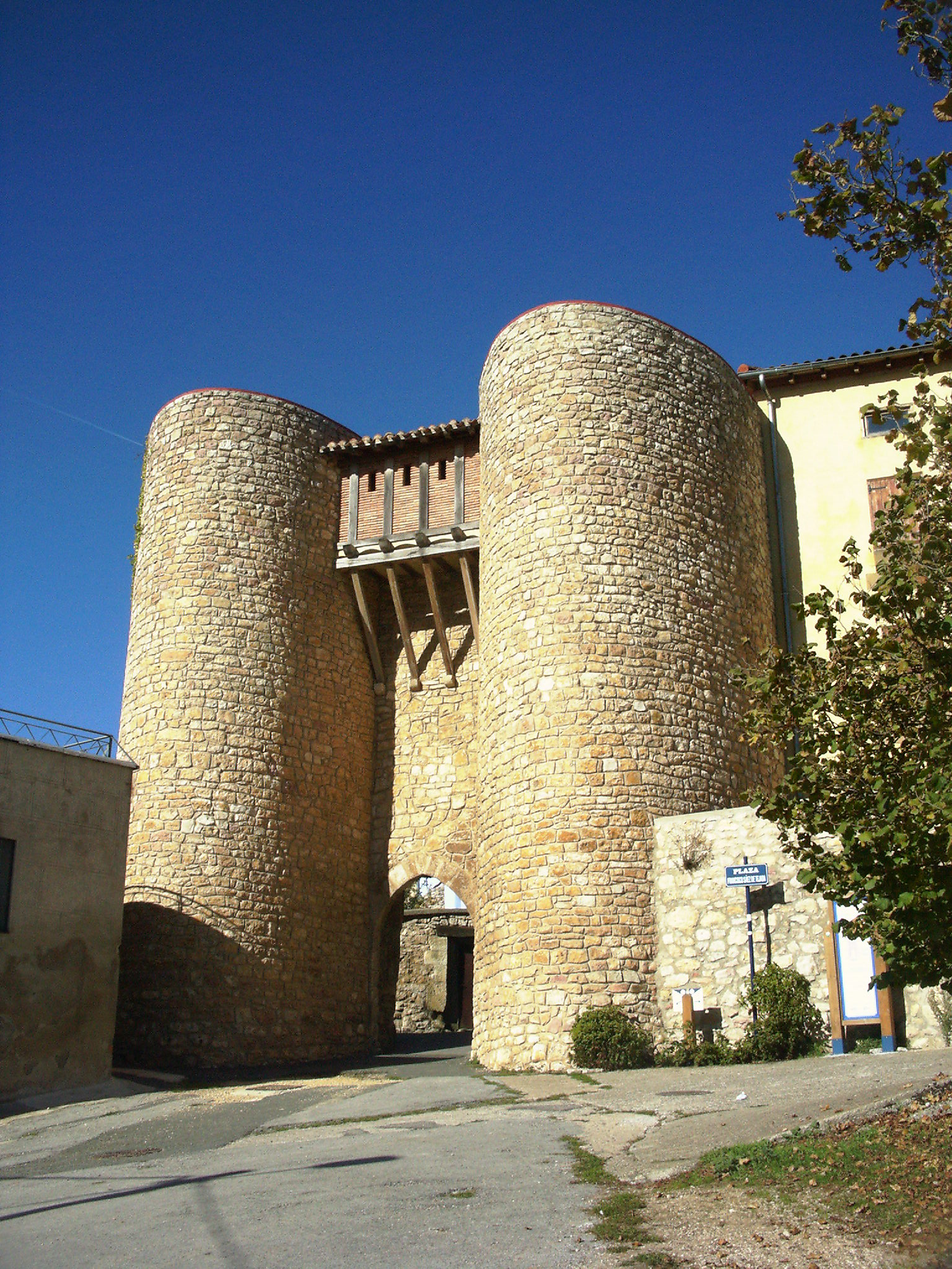 Urizaharrako harresiko hego-ataria.